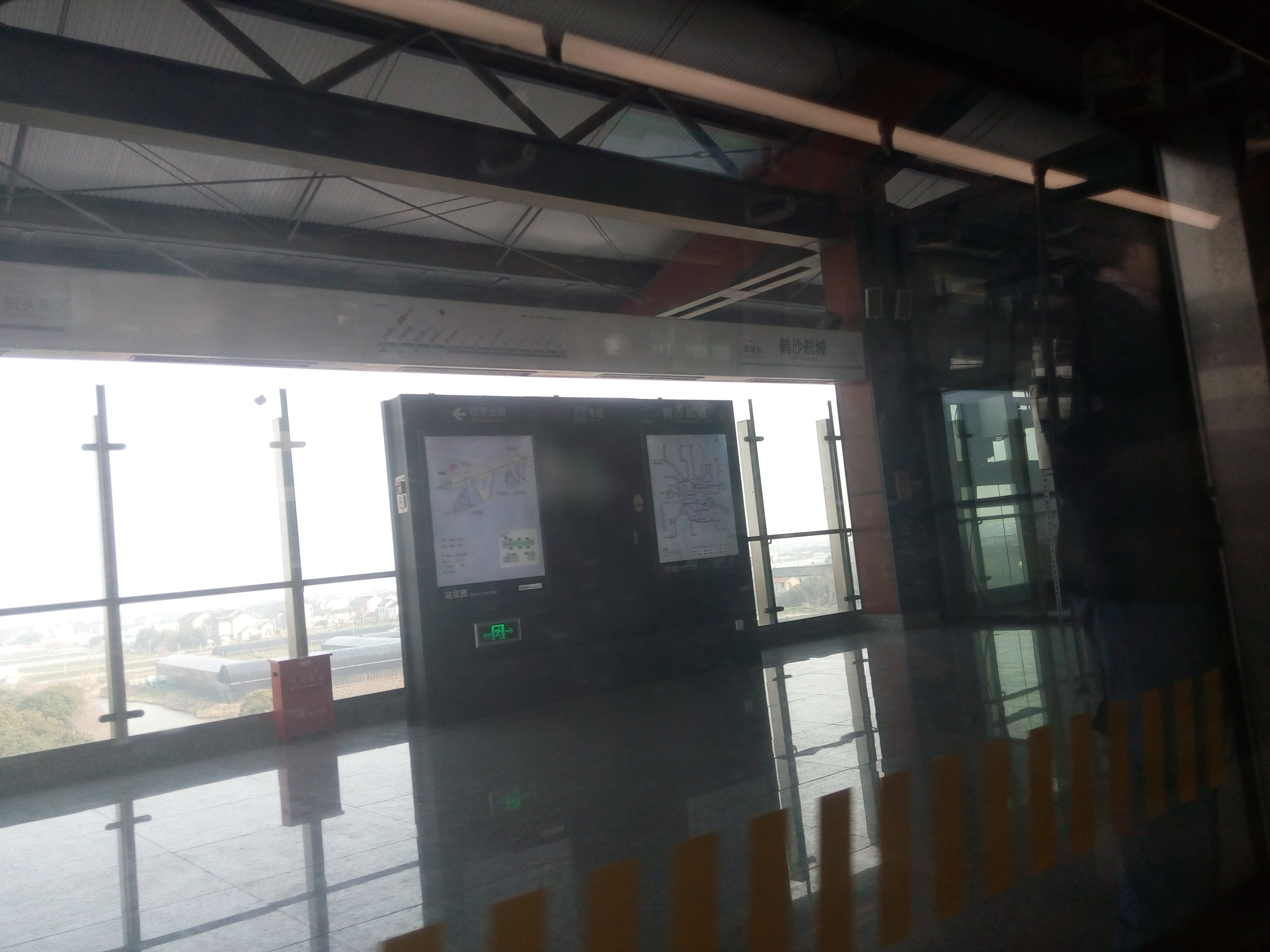 鹤沙航城站 罗山路方向列车拍摄 罗山路方向站台